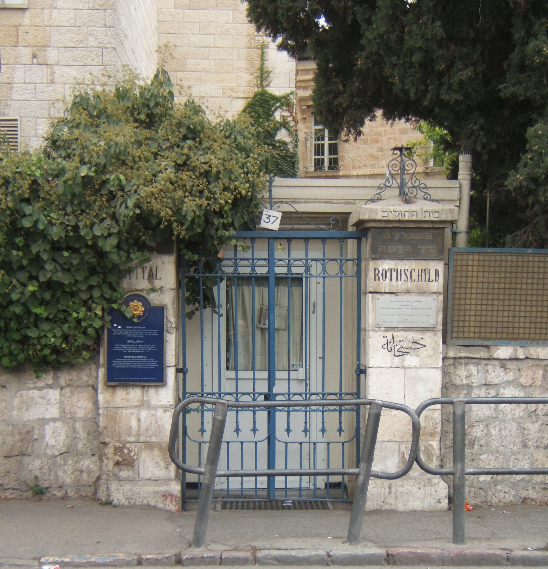 Rothschild Hospital, Jerusalem